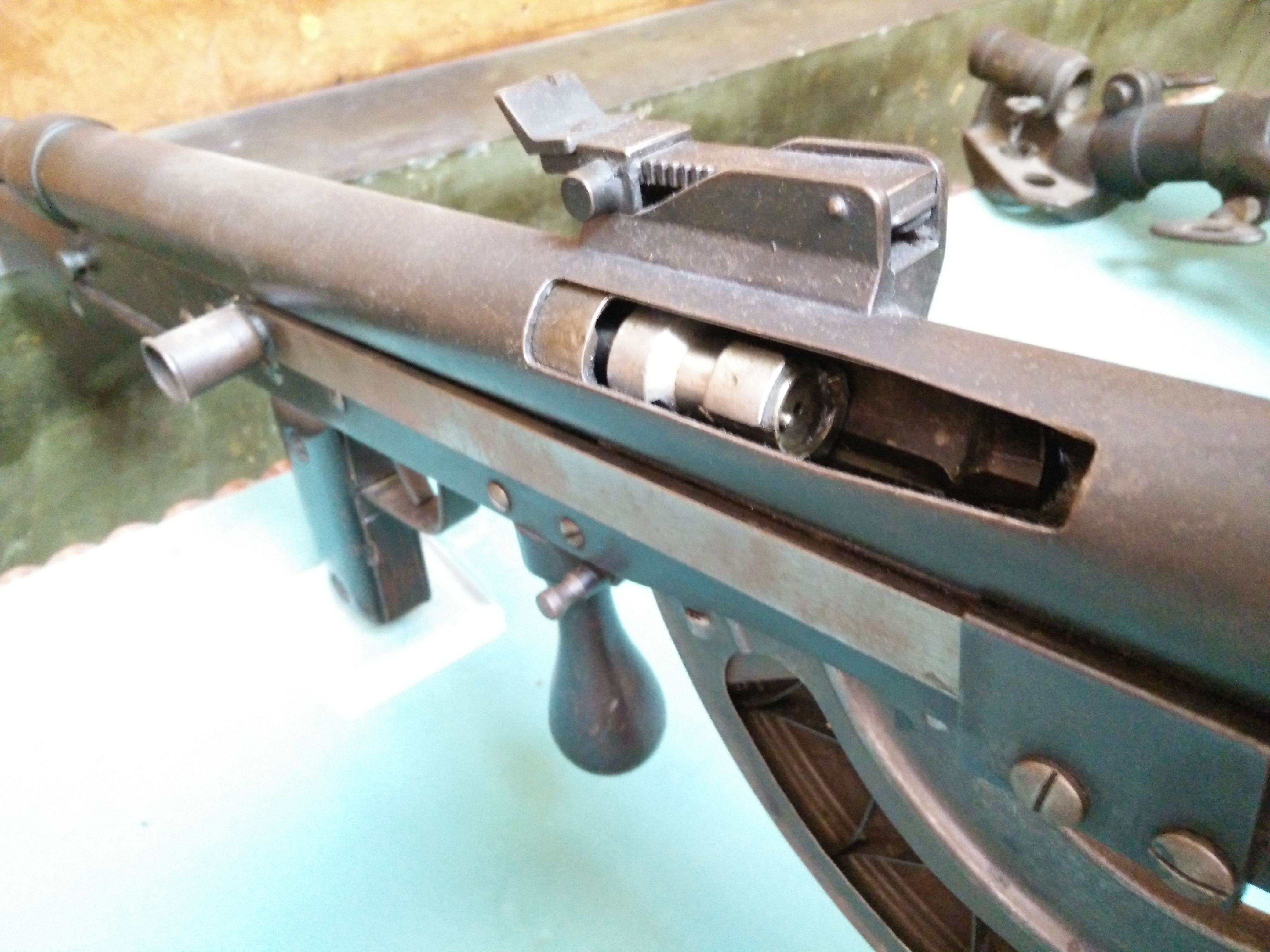 Zaklep mitraljeza Chauchat